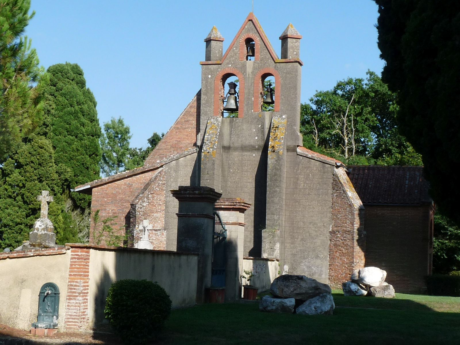 Eglise de Pouze, Haute-Garonne, France